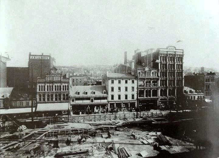 Construction de la troisième église Saint-Roch vers 1915 « L'actuelle église Saint-Roch est la troisième à se trouver au même emplacement, entre les rues Saint-Joseph et Saint-François. La première apparaît en 1811 alors qu’on construit un petit temple servant de desserte à la cathédrale de Québec. Le 17 décembre 1816, il y a 200 ans aujourd’hui, à peine est-elle terminée qu’elle est détruite par un incendie. Elle sera aussitôt reconstruite, mais dans des proportions beaucoup plus imposantes avec, notamment, deux tours en façade. C'est Thomas Baillairgé qui en dessine les plans. Partiellement détruite lors de l'incendie du faubourg Saint-Roch le 28 mai 1845, elle est reconstruite à même les ruines. La paroisse qui avait été érigée canoniquement en 1829 grandit rapidement et, en 1880, on croit devoir la reconstruire, mais on hésite beaucoup. On passe finalement à l'action en 1914 en démolissant l'édifice devenu trop petit. Les travaux de construction de l'église actuelle débutent en 1915 et s'échelonnent jusqu'en 1920. Ce sont les architectes Talbot et Dionne qui en dessine les plans en lui donnant un style dit néomédiéval qui marie les styles roman et gothique. Jusqu'à la construction d'un hôtel en hauteur situé immédiatement face à son parvis, c’est cette église prestigieuse qui dominait le quartier Saint-Roch. » – Société historique de Québec